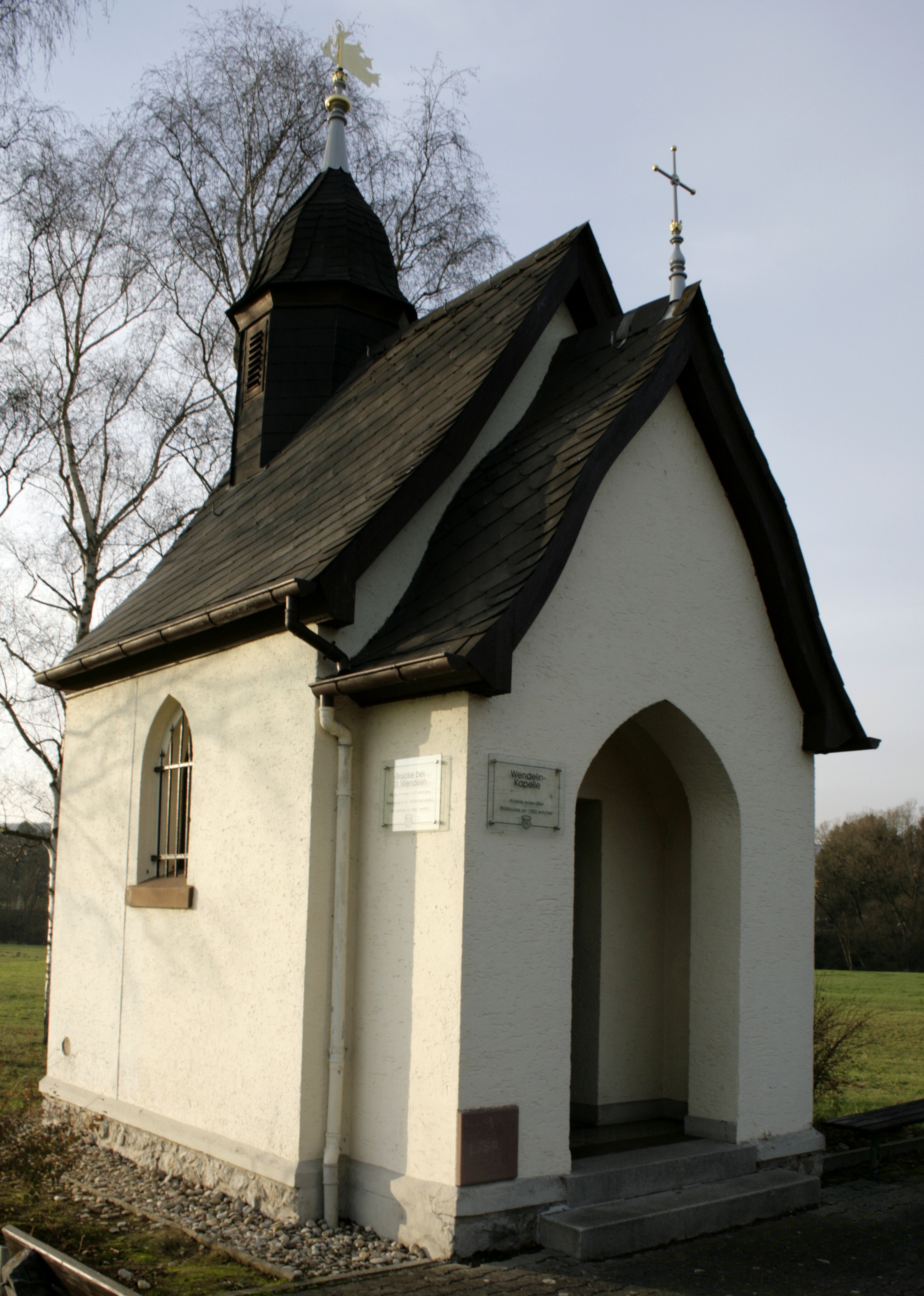 Kapelle St. Wendelin in Niederhadamar, Deutschland